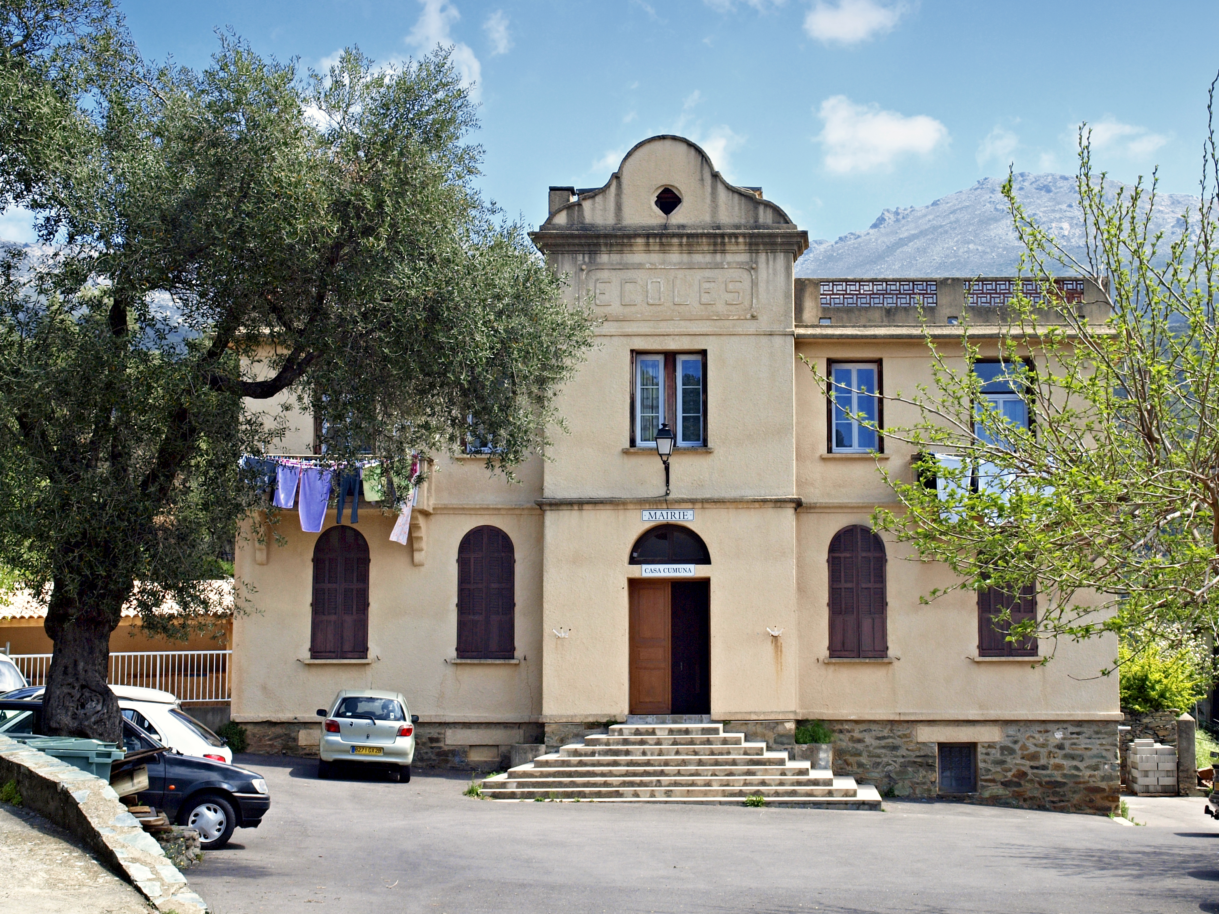 Olmeta-di-Capocorso (Corsica) - Mairie